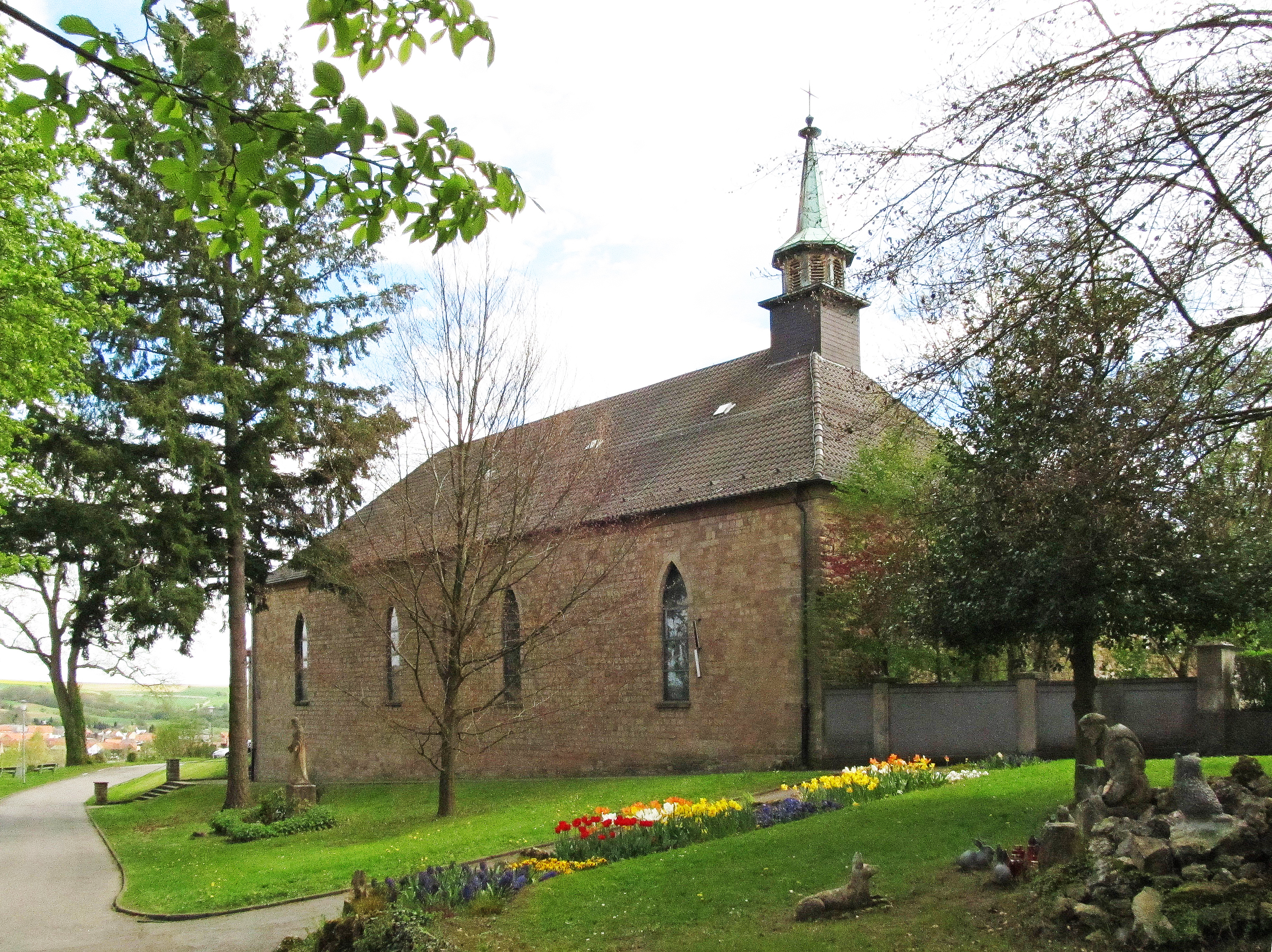 Kirche des Klosters Blieskastel